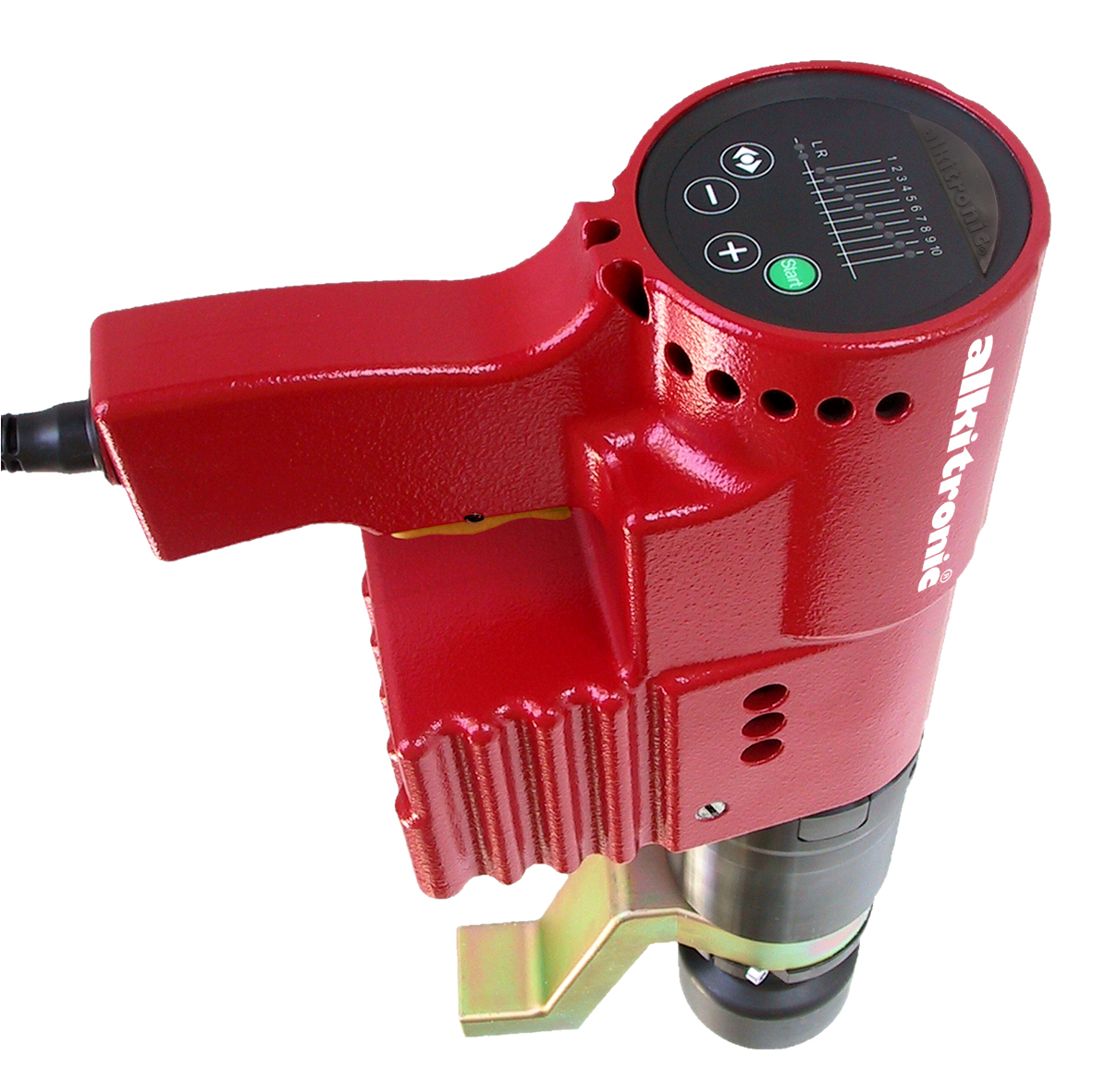 Elektroschrauber von alki TECHNIK